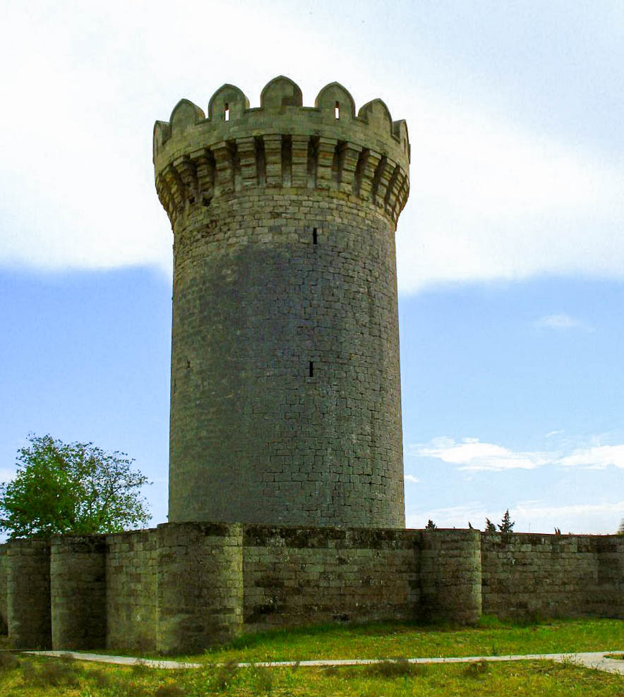 Круглая башня в Мардакян